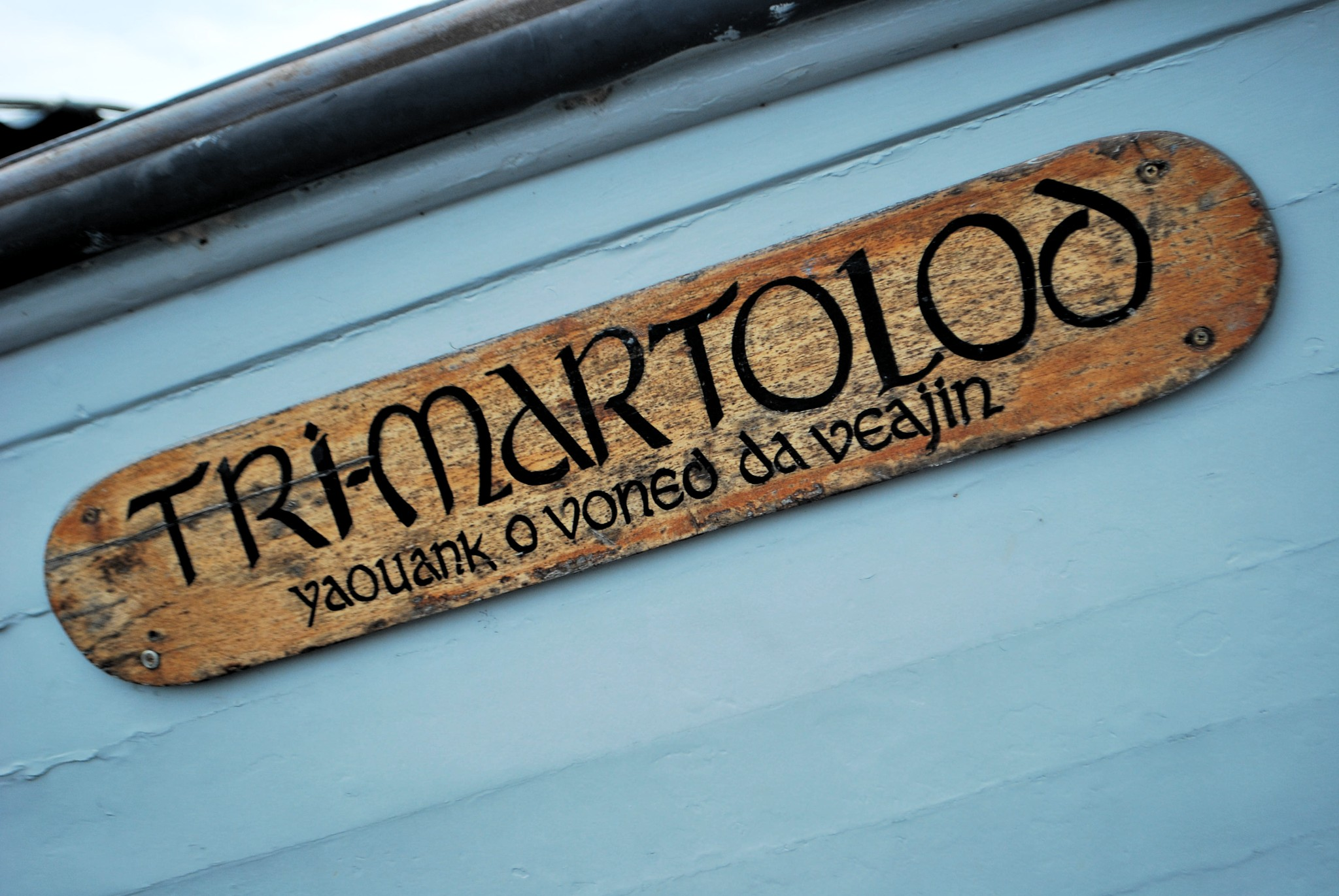 yaouank o voned da veajin